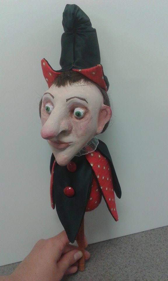 Papjeemašee tehnikas tehtud teatrinuku pea. Autor: Merilin Sillastu